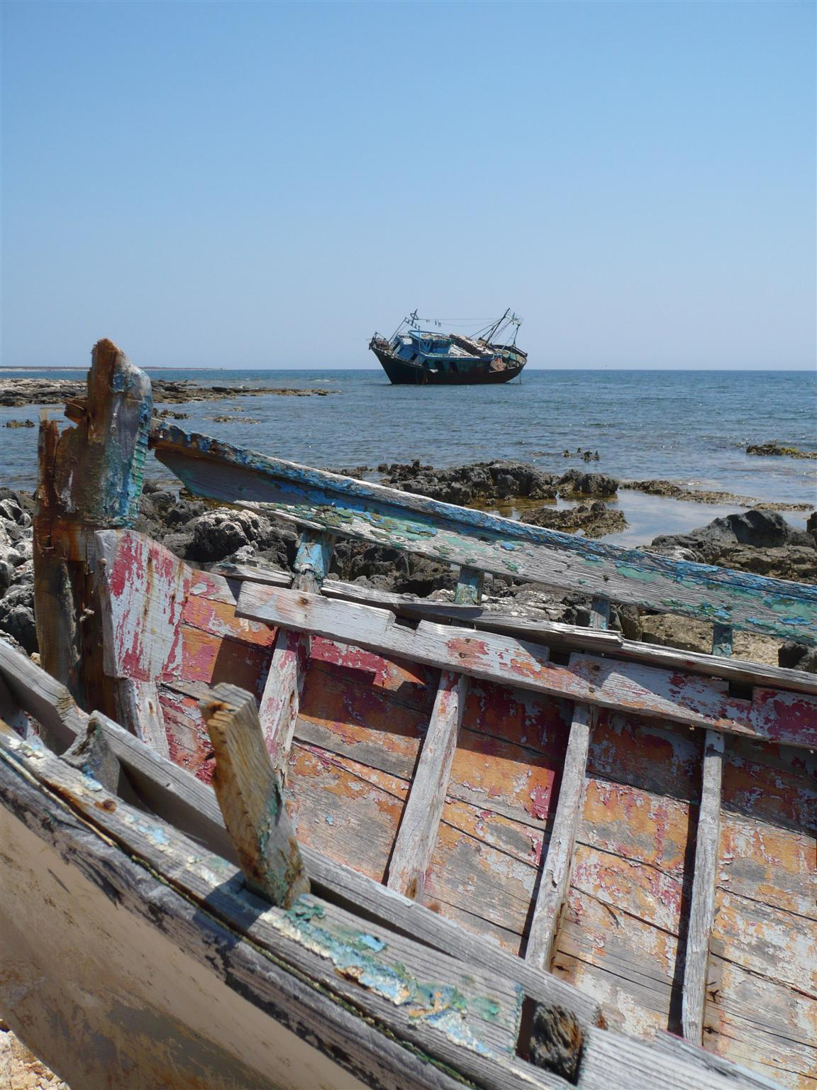 Pipitona-Guardiani, 96010 Portopalo di capo Passero SR, Italy